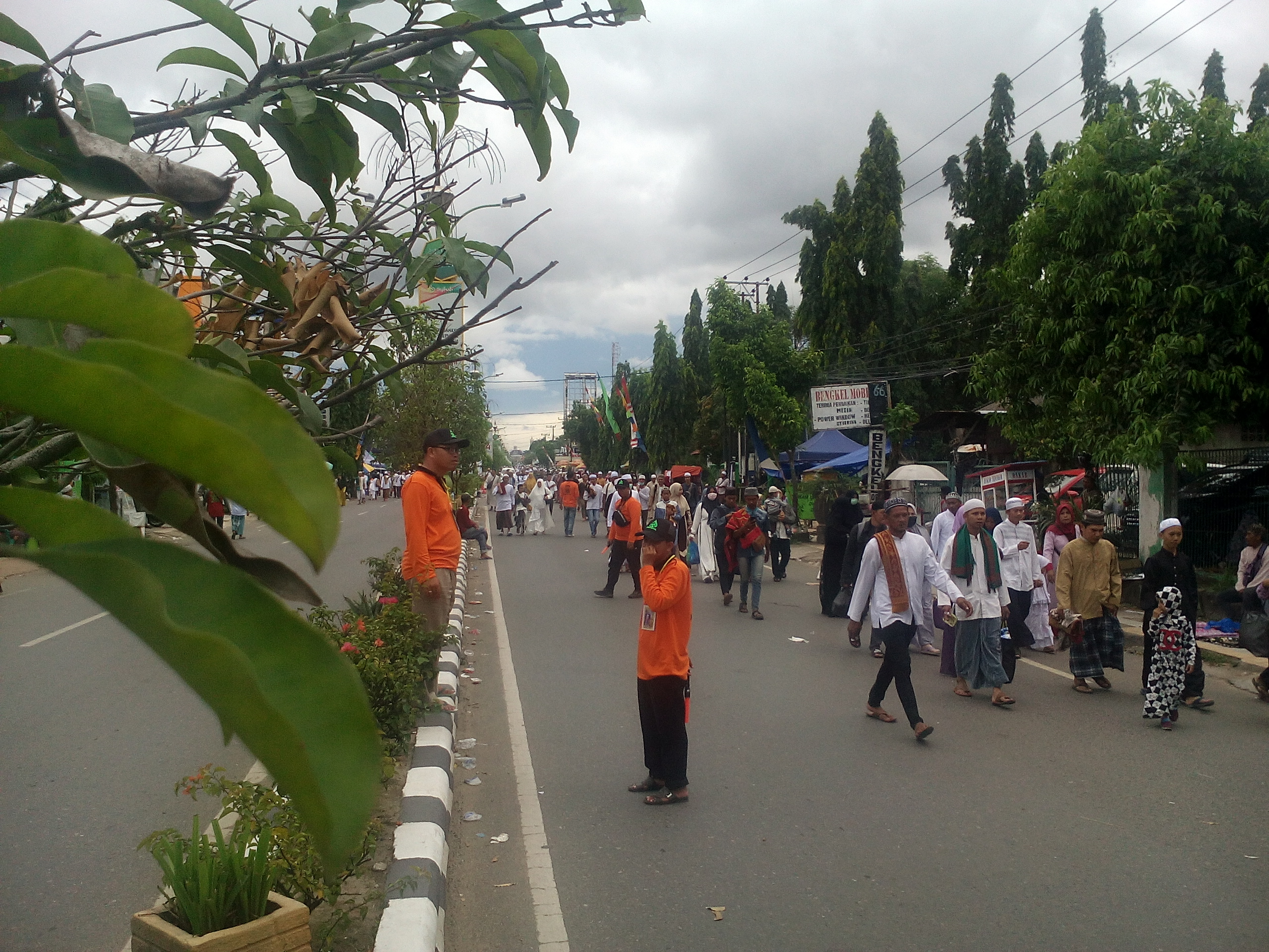 Relawan haul guru sekumpul merupakan petugas yang menyambut dan menertibkan jamaah haul guru sekumpul yang tanpa di gajih atau sukarelawan, hanya berkah dan rahmat dari allah swt yang mereka harapkan. Tak terbayangkan lelah yang mereka rasakan menertibkan jutaan jamaah yang datang dari berbagai daerah.